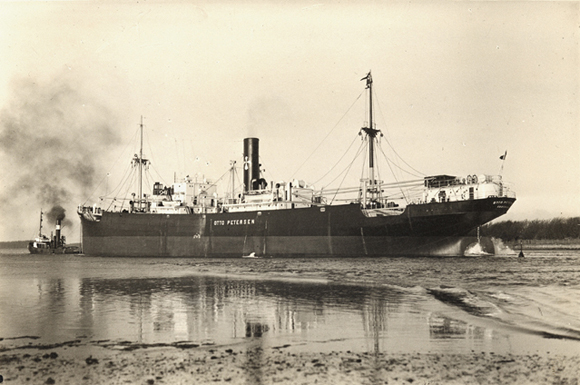 Fragtskibet S/S Otto Petersen. Fotograferet kort efter prøvesejladsen af Helsingør Værft. Privateje.